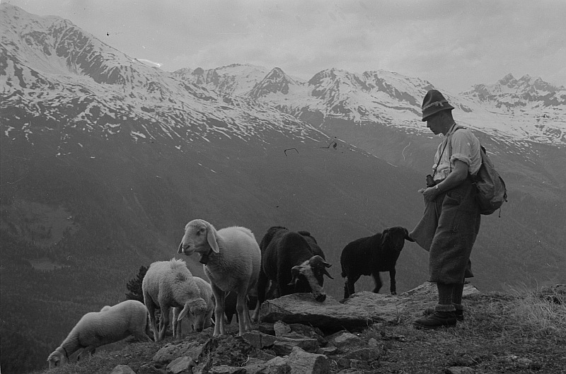 Original image description from the Deutsche Fotothek Schafherde und Hirte? im Ötztal